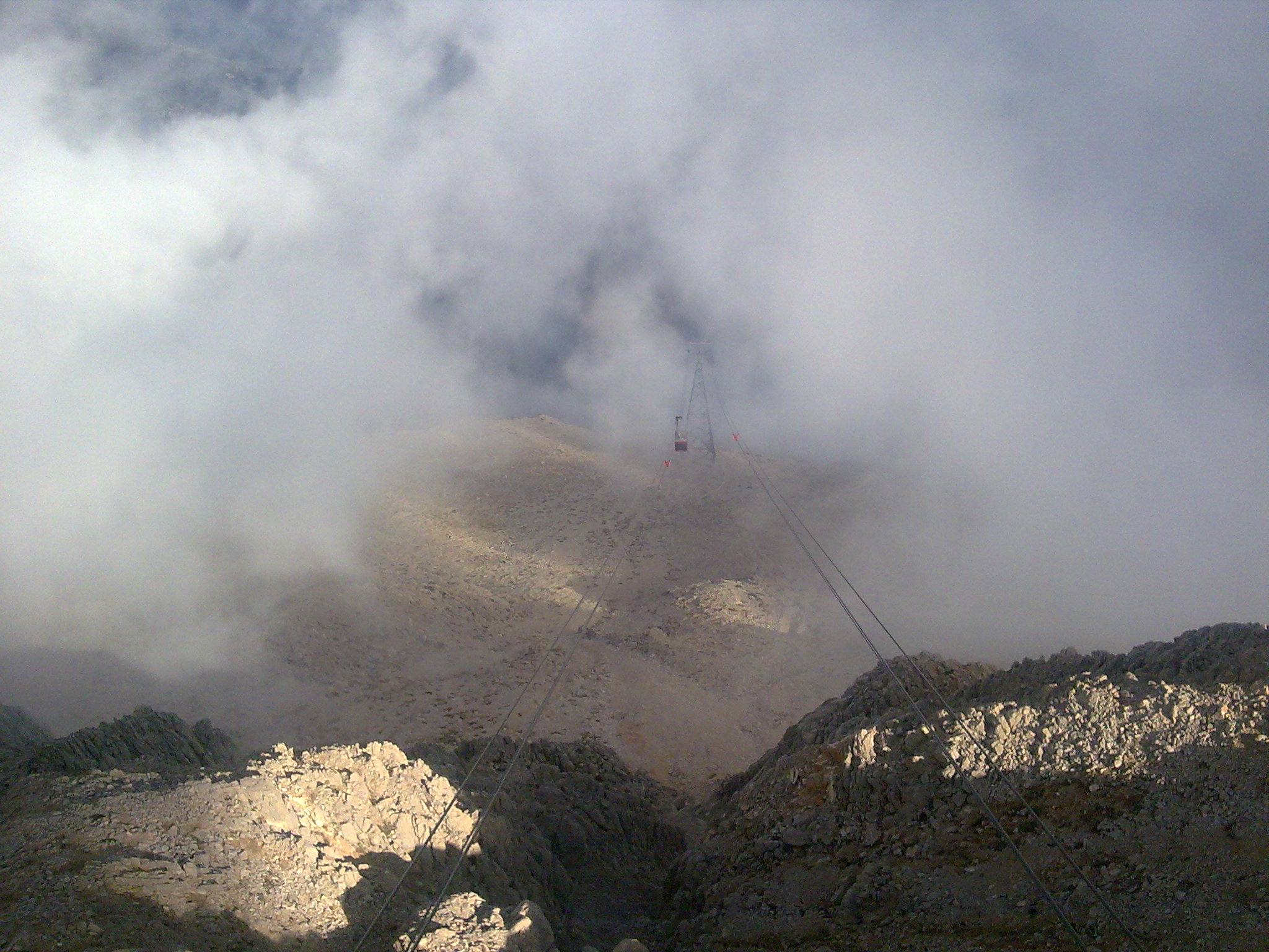 Toros Dağları'nın batısında bulunan Bey Dağları'ndan Tahtalı Dağı'ndan bir görüntü.